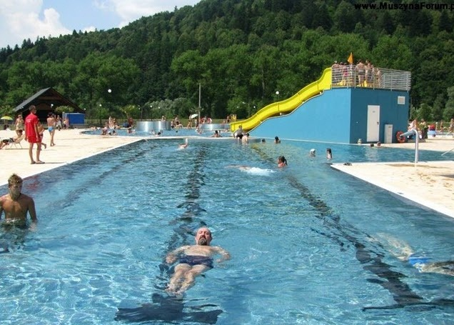 Baseny w Muszynie na Zapopradziu